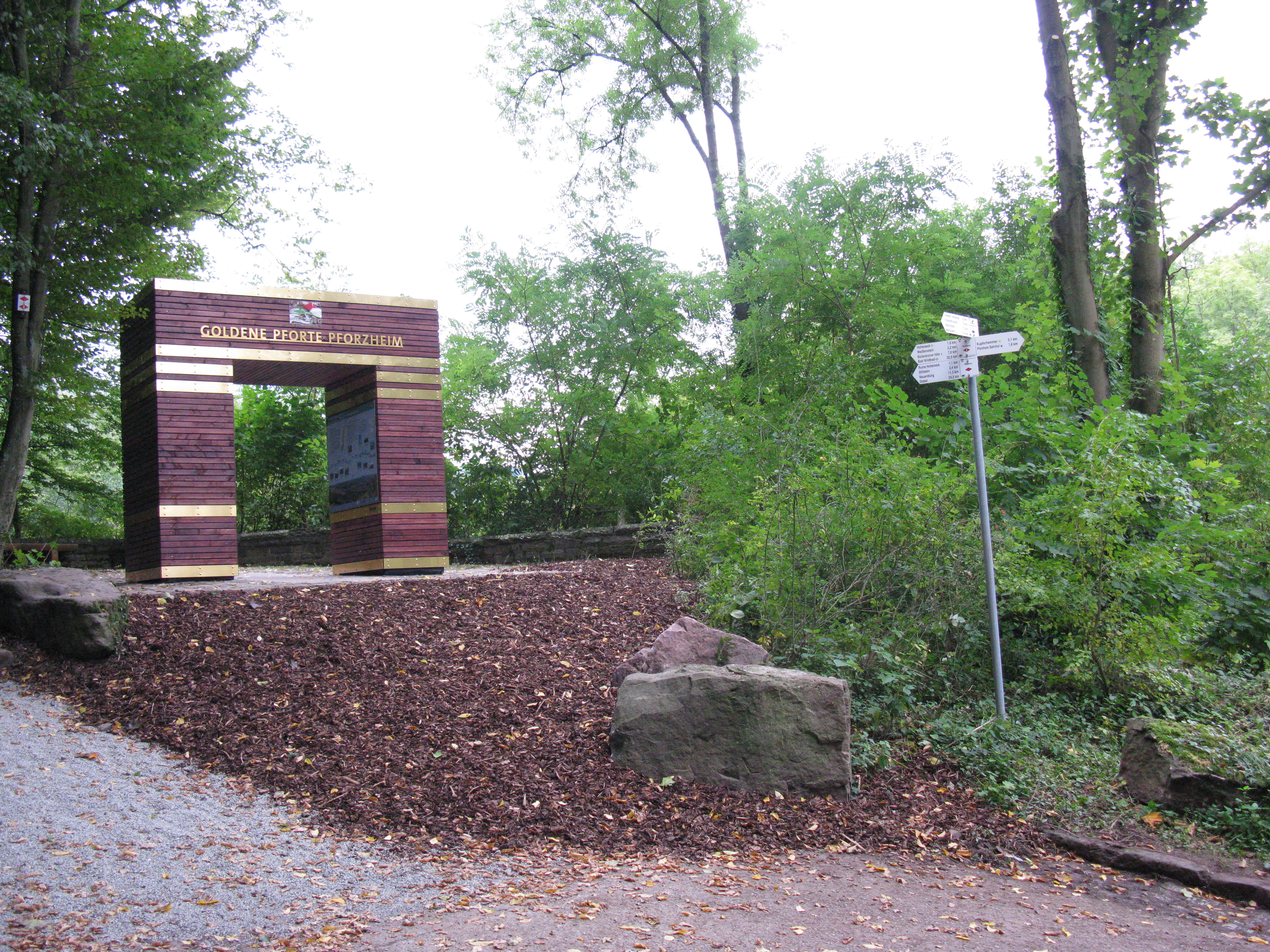 Die "Goldene Pforte Pforzheim" das Tor zum Westweg steht oberhalb der Gaststätte Kupferhammer am Beginn des Wanderweges